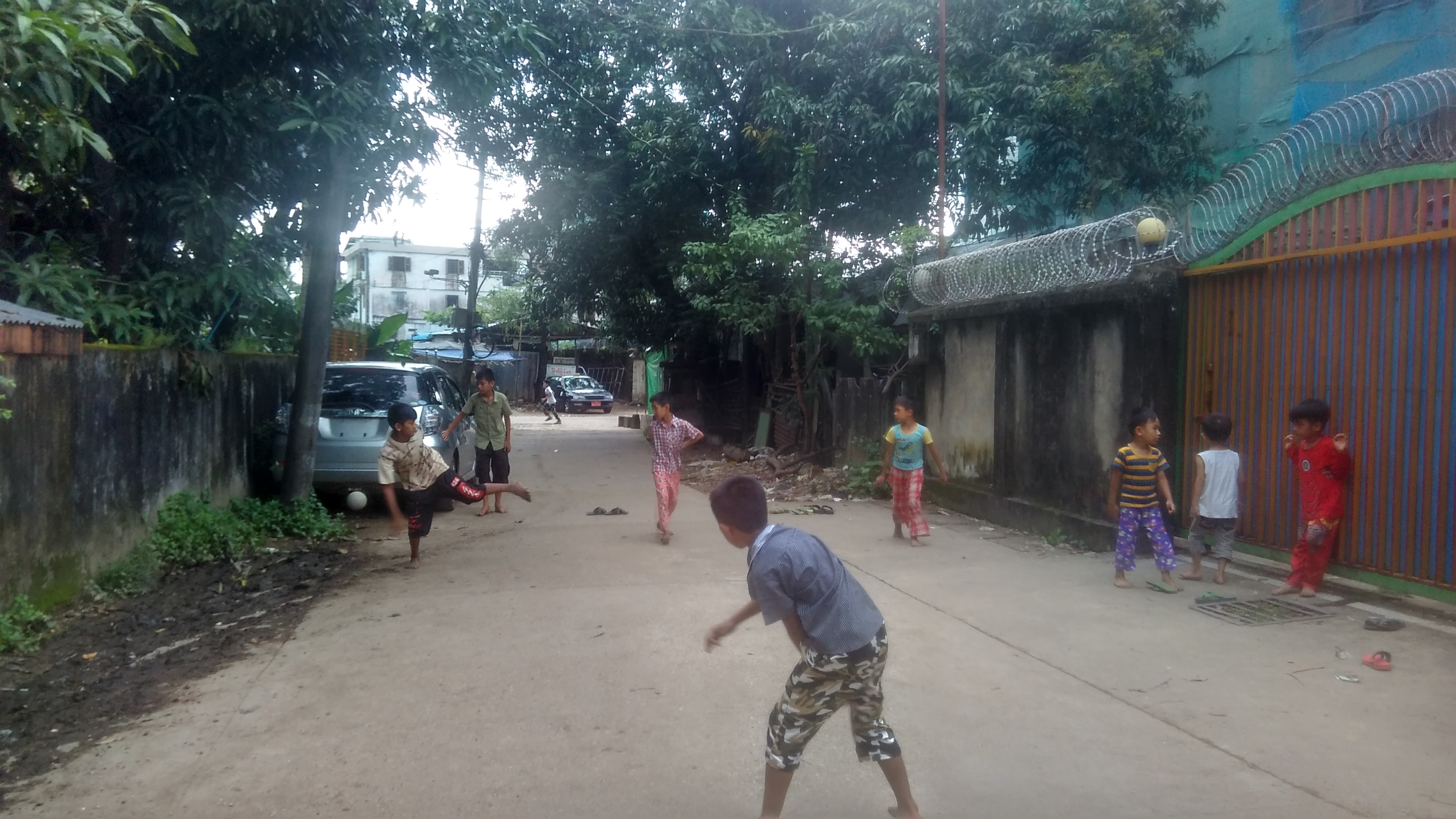 ကလေးများ ဥဖမ်းကစားနေကြပုံ။ ဤပုံကို တာမွေမြို့နယ်၊ မေတ္တာညွန့်ရပ်ကွက်၊ စက်မှု (၅) လမ်းတွင် ရိုက်ကူးသည်။